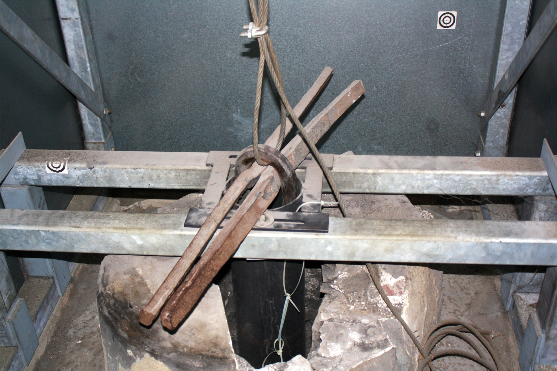 Befestigung des Barbarossa-Leuchters oberhalb des Oktogons